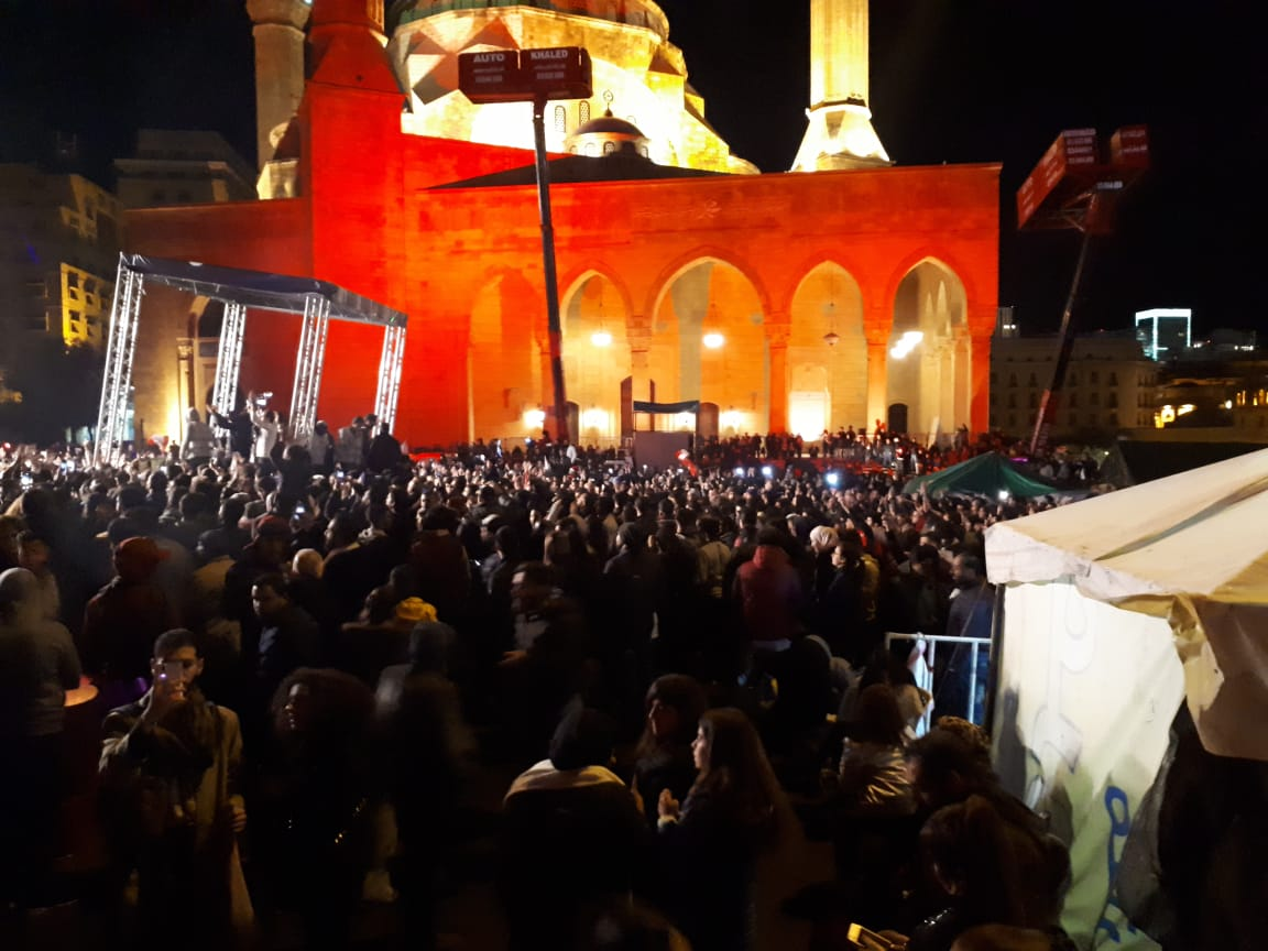 Neujahrsveranstaltung der Bürgerbwwegung auf dem Beiruter Martyrerplatz 2019/2020